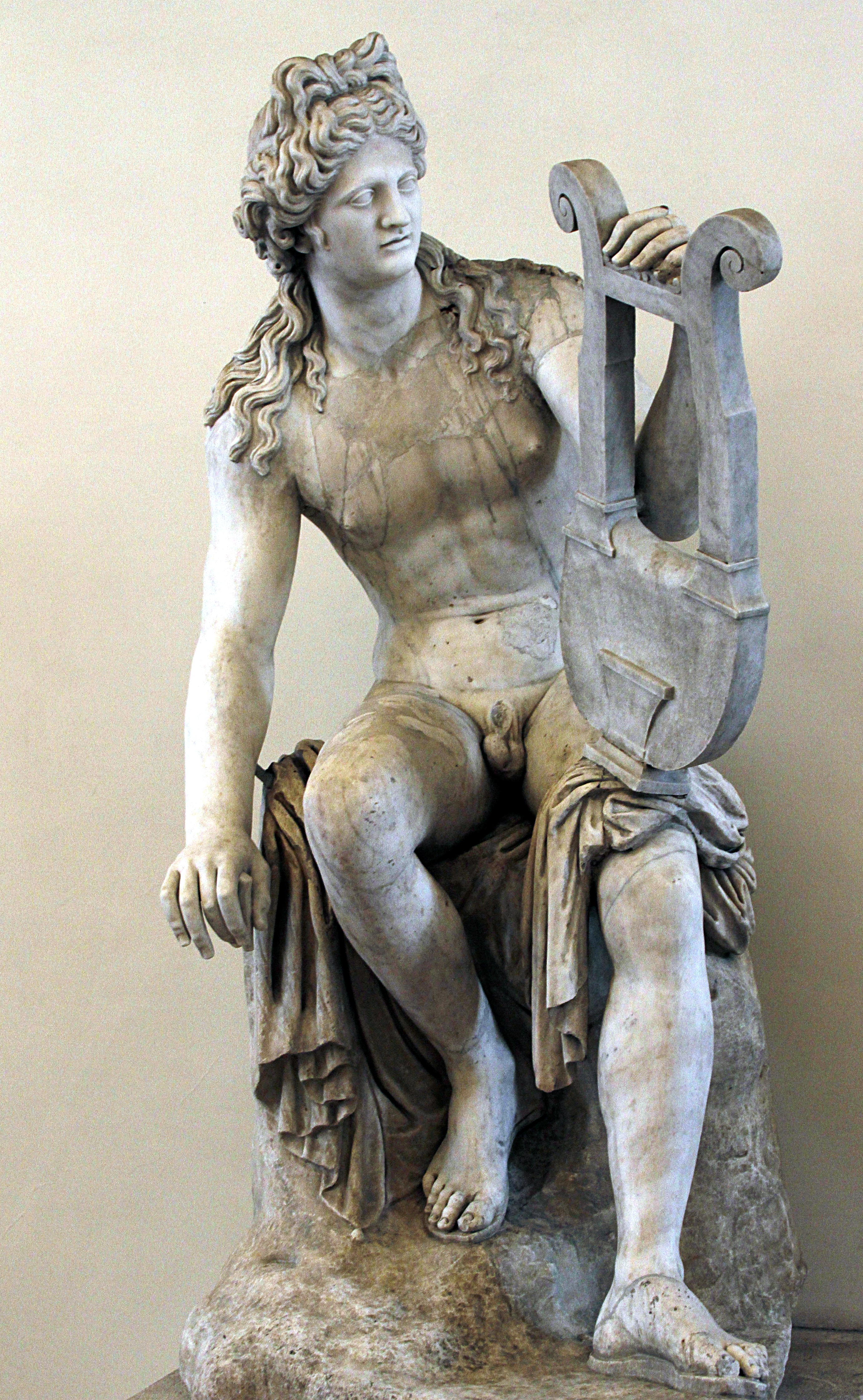 Palazzo Altemps - Rome